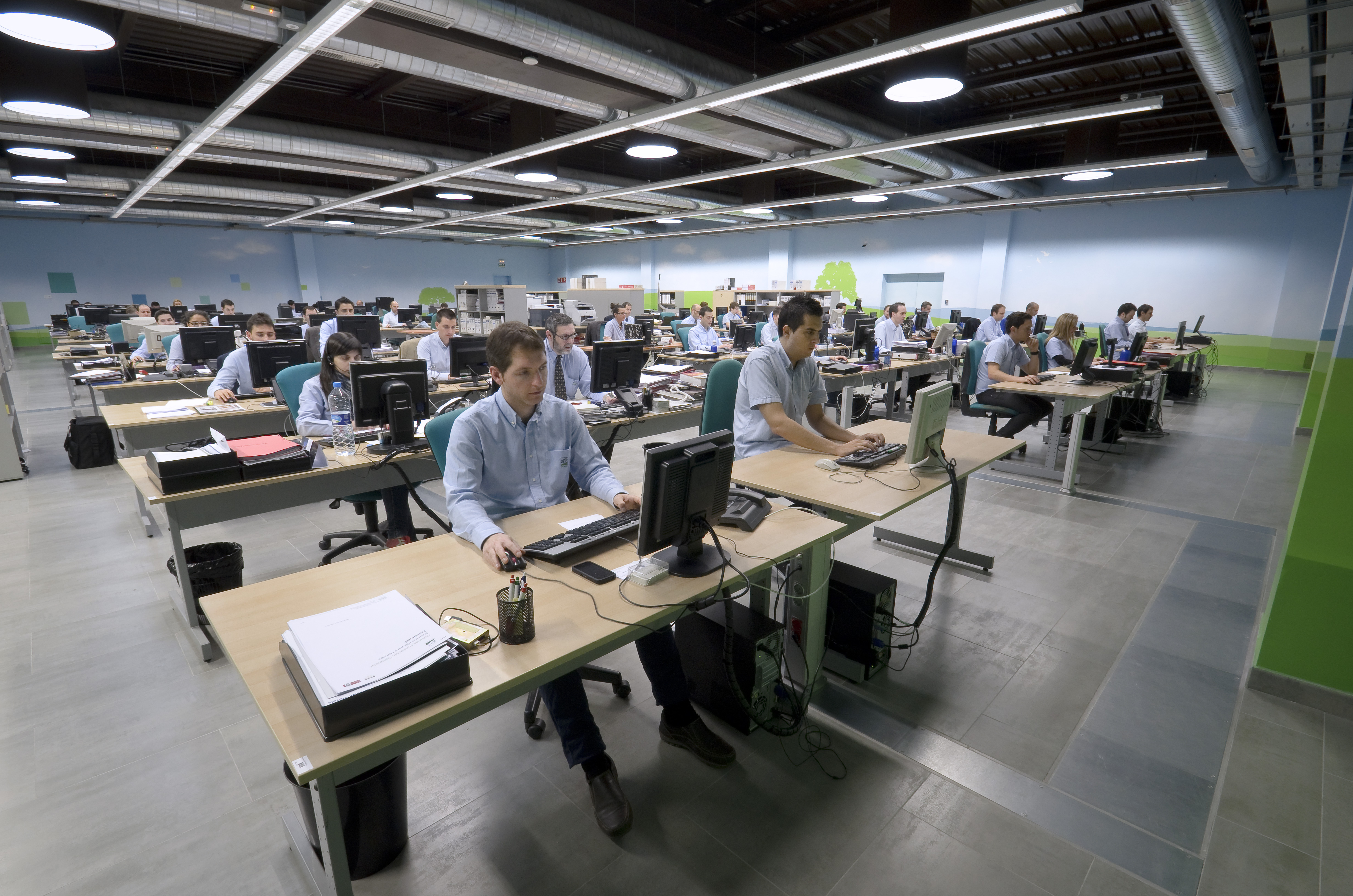 Sala de Trabajo - ICG Software